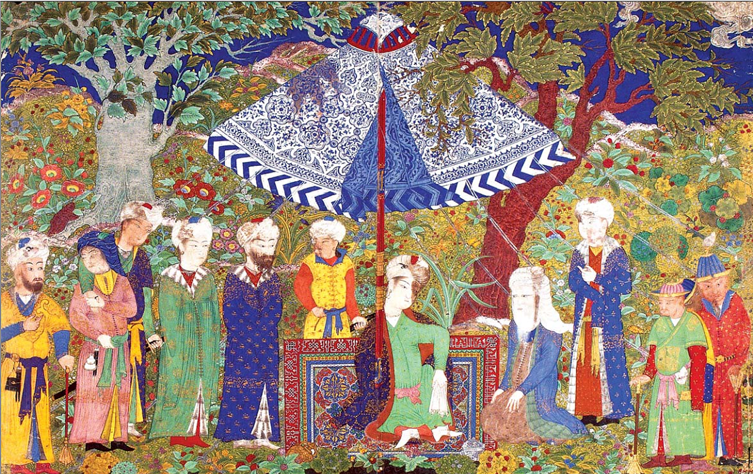 Портрет Ягуб-бека с придворными. Альбом Мехмета Завоевателя